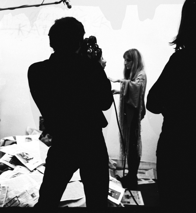 Das Abonnement, 1967. Kurzfilm mit Gudrun Ensslin und Lienhard Brunner. Regie: Ali Limonadi